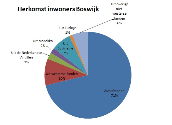 Informatie van (B09)